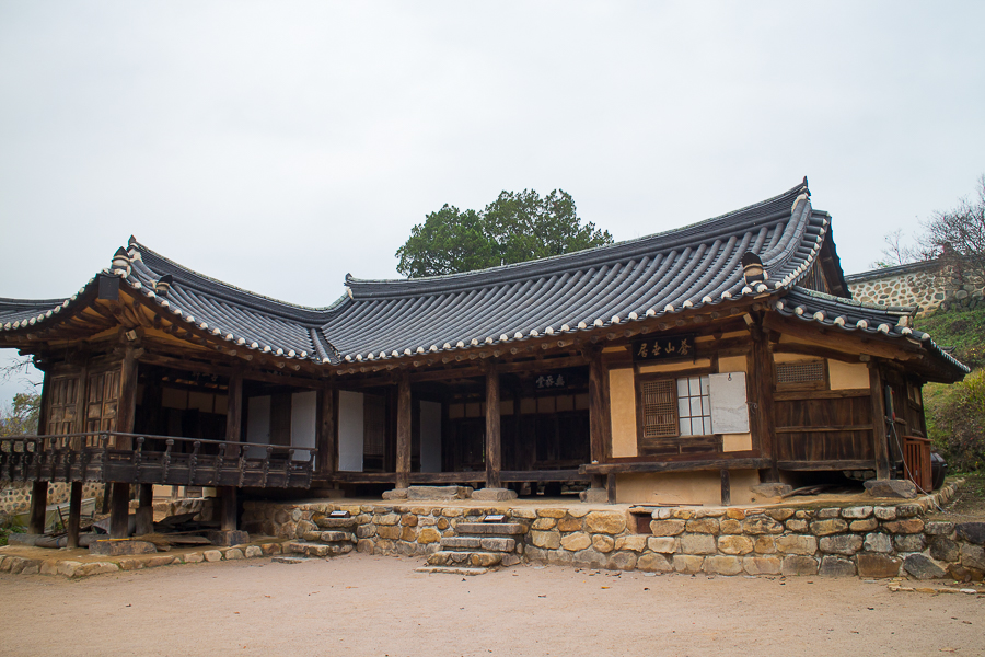 양동 무첨당